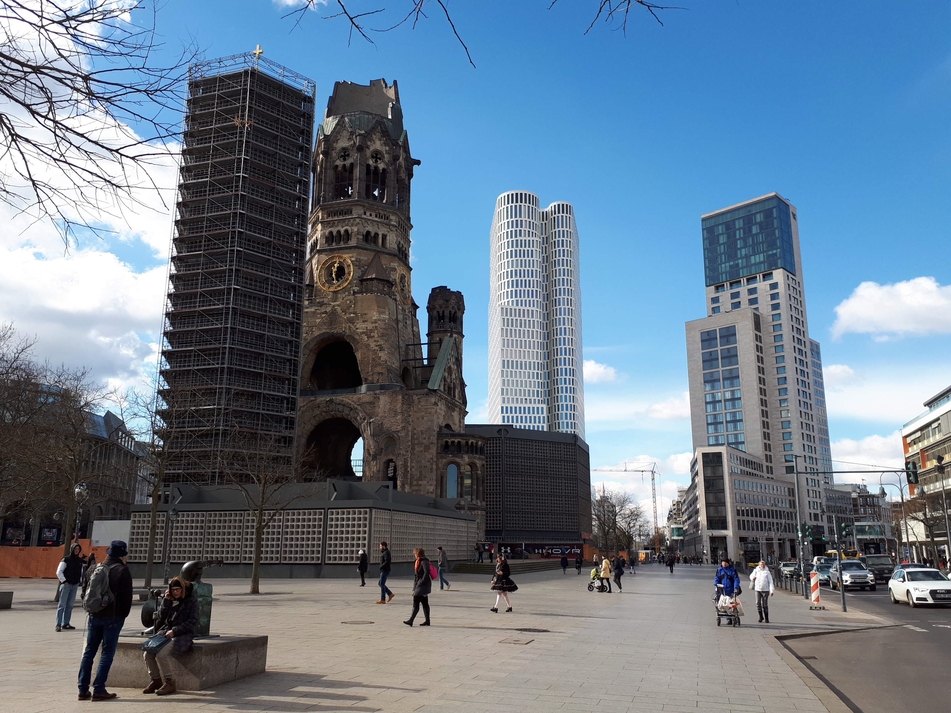 Charlottenburg Breitscheidplatz mit Kaiser-Wilhelm-Gedächtniskirche, Upper West und Zoofenster (Waldorf- Astoria)